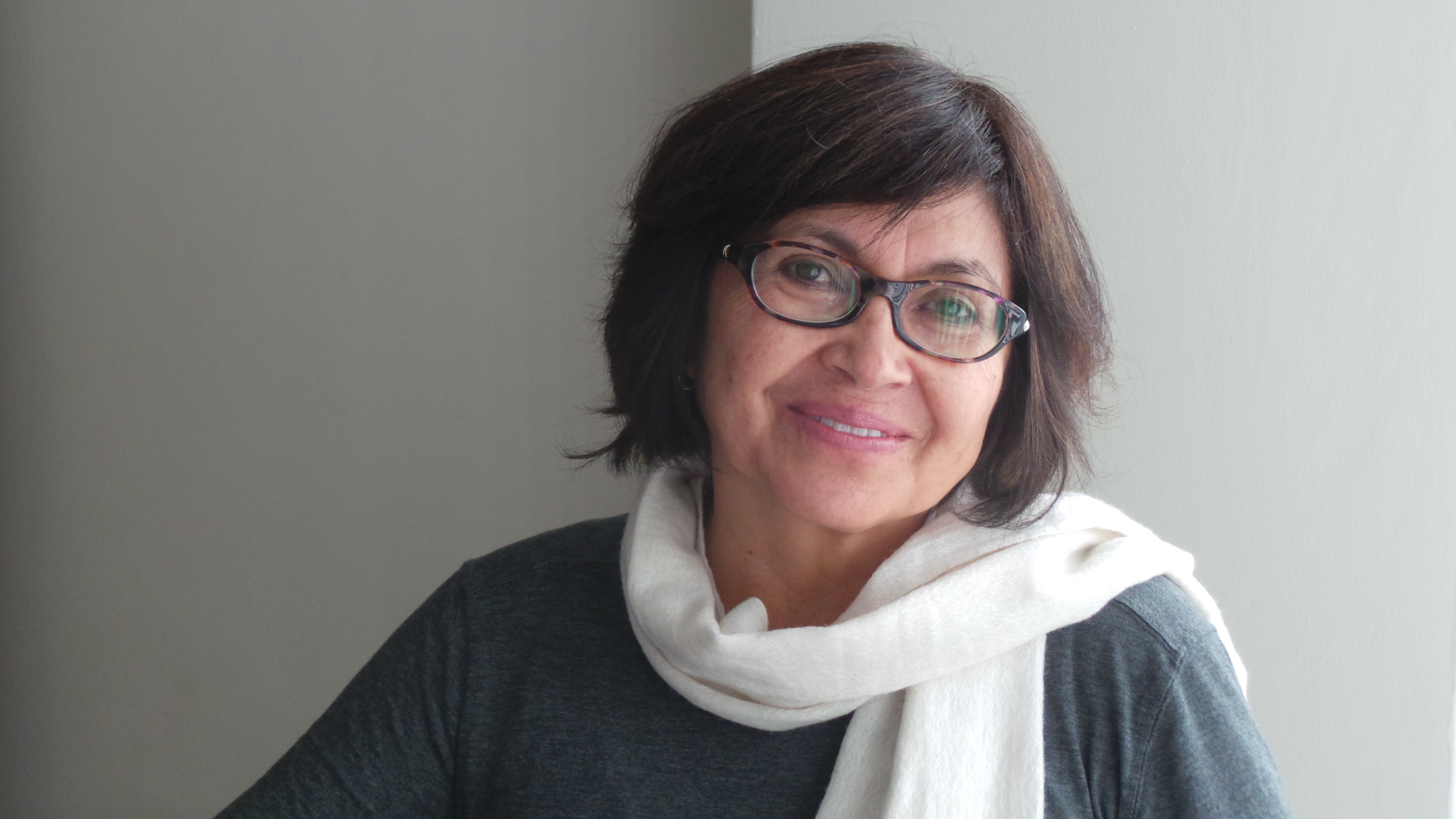 Economista ecuatoriana, asesora en el proceso constituyente ecuatoriano, especialista en economía y "buen vivir"